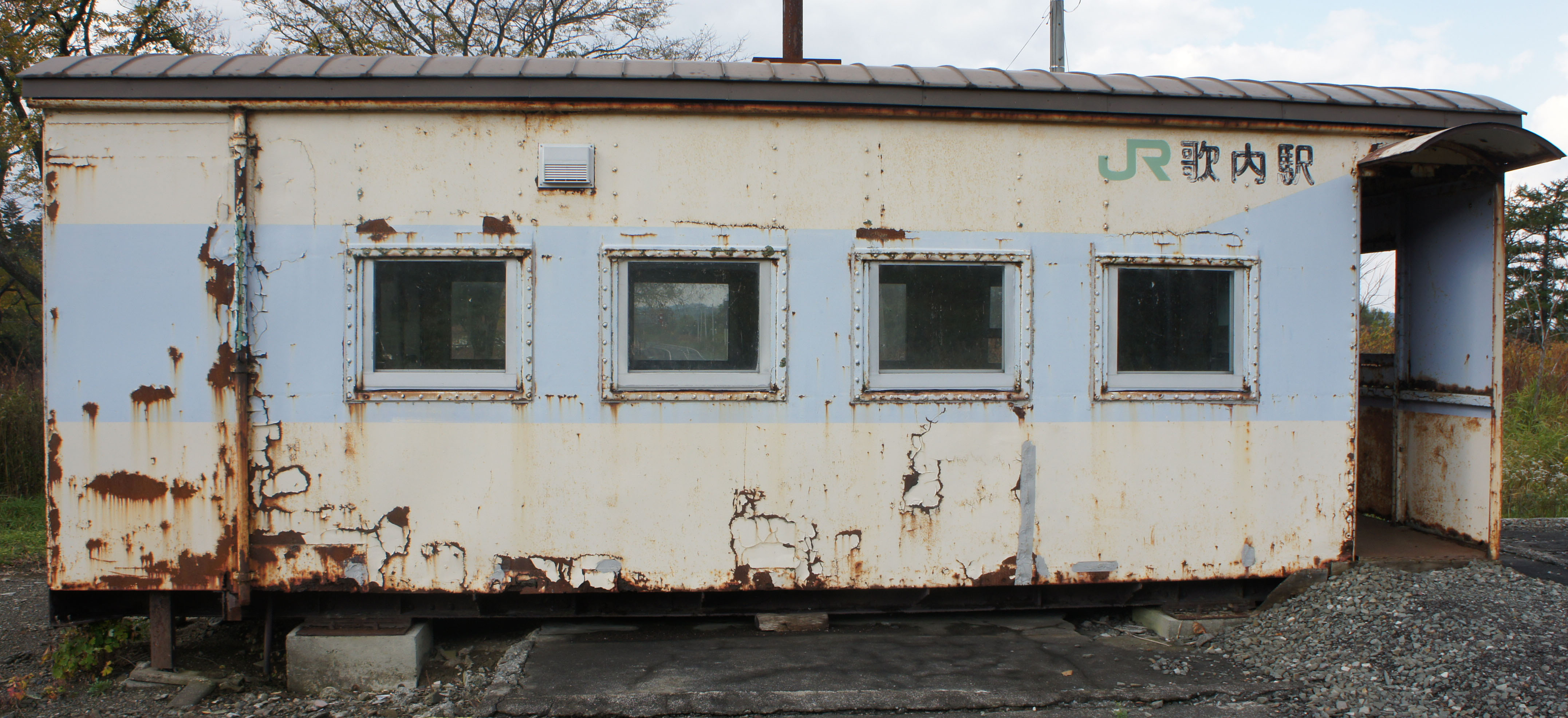 JR宗谷本線・歌内駅のホームから見た駅舎 Sony NEX-3